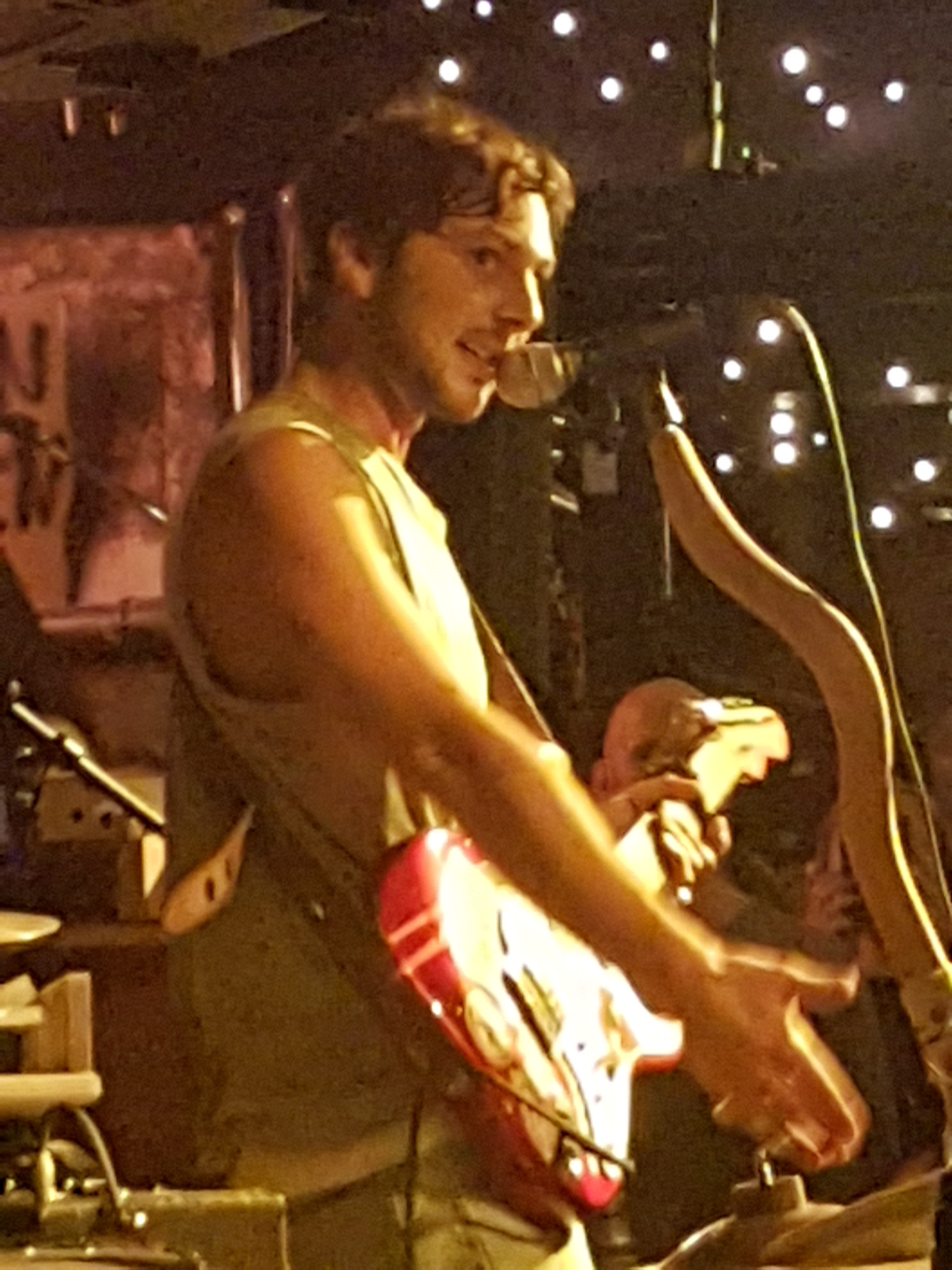 Andreas Grega under en spelning på Scalateaterns källare 2016-11-02.